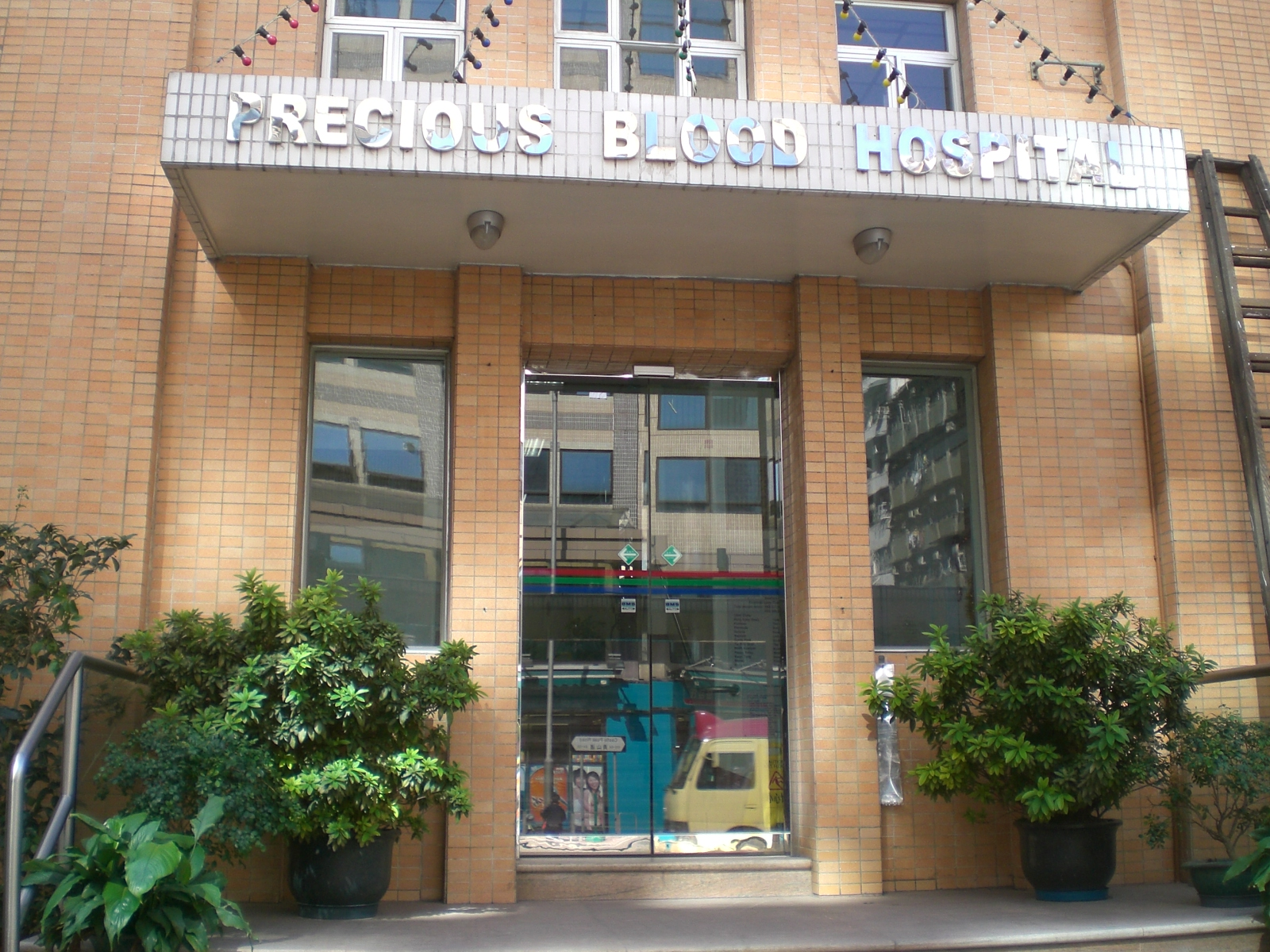 深水埗青山道寶血醫院 (明愛)